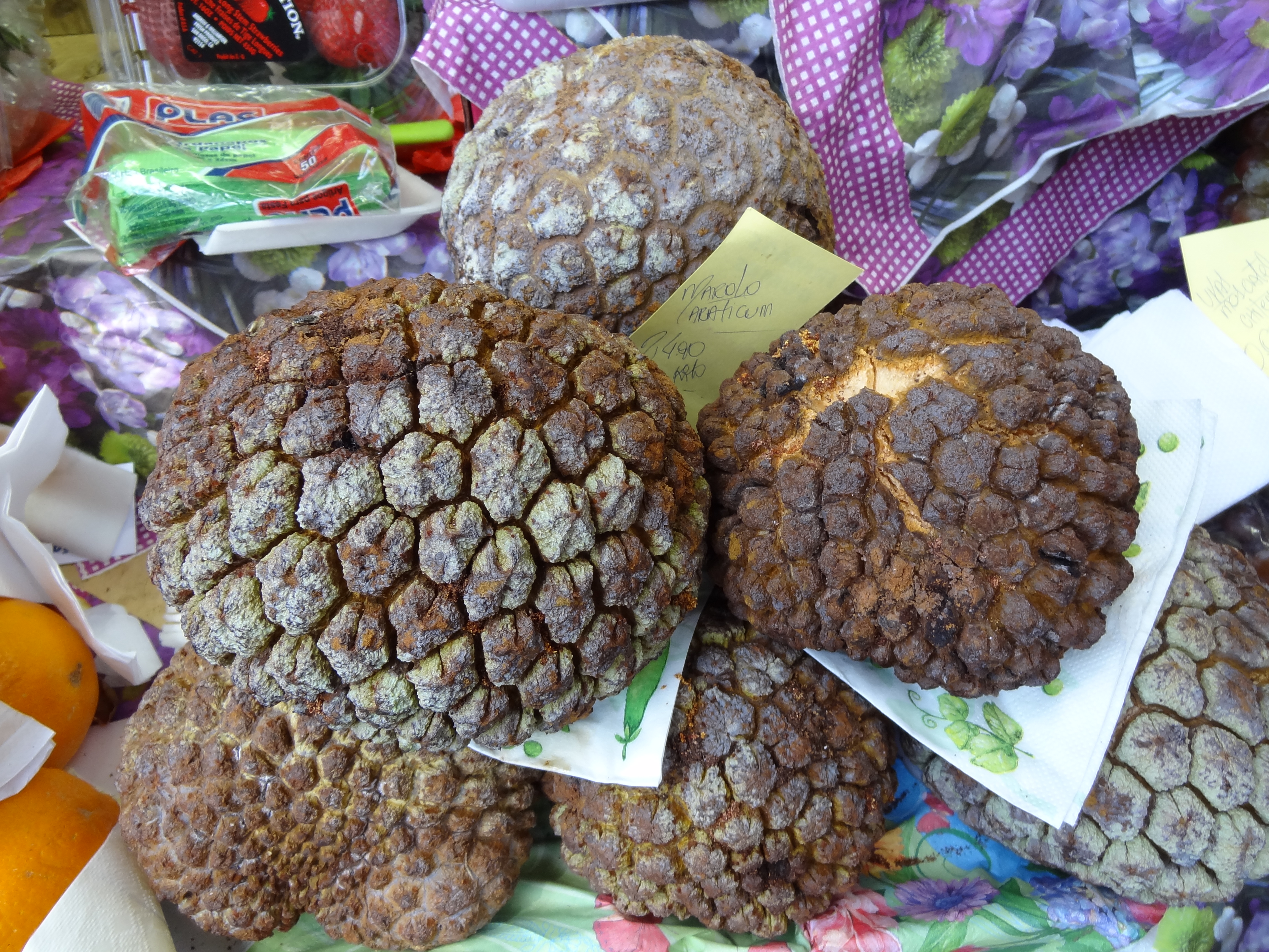 Uma foto do fruto Marolo no mercado de São Paulo